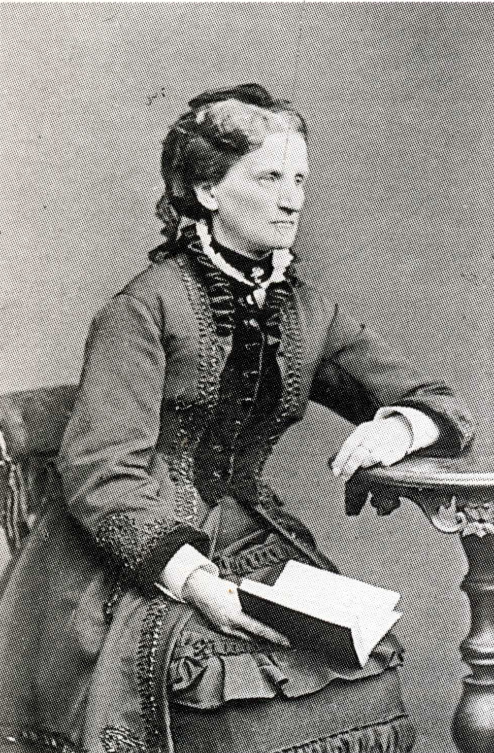 Kirjailija Adelaïde Ehrnrooth (1826–1905)